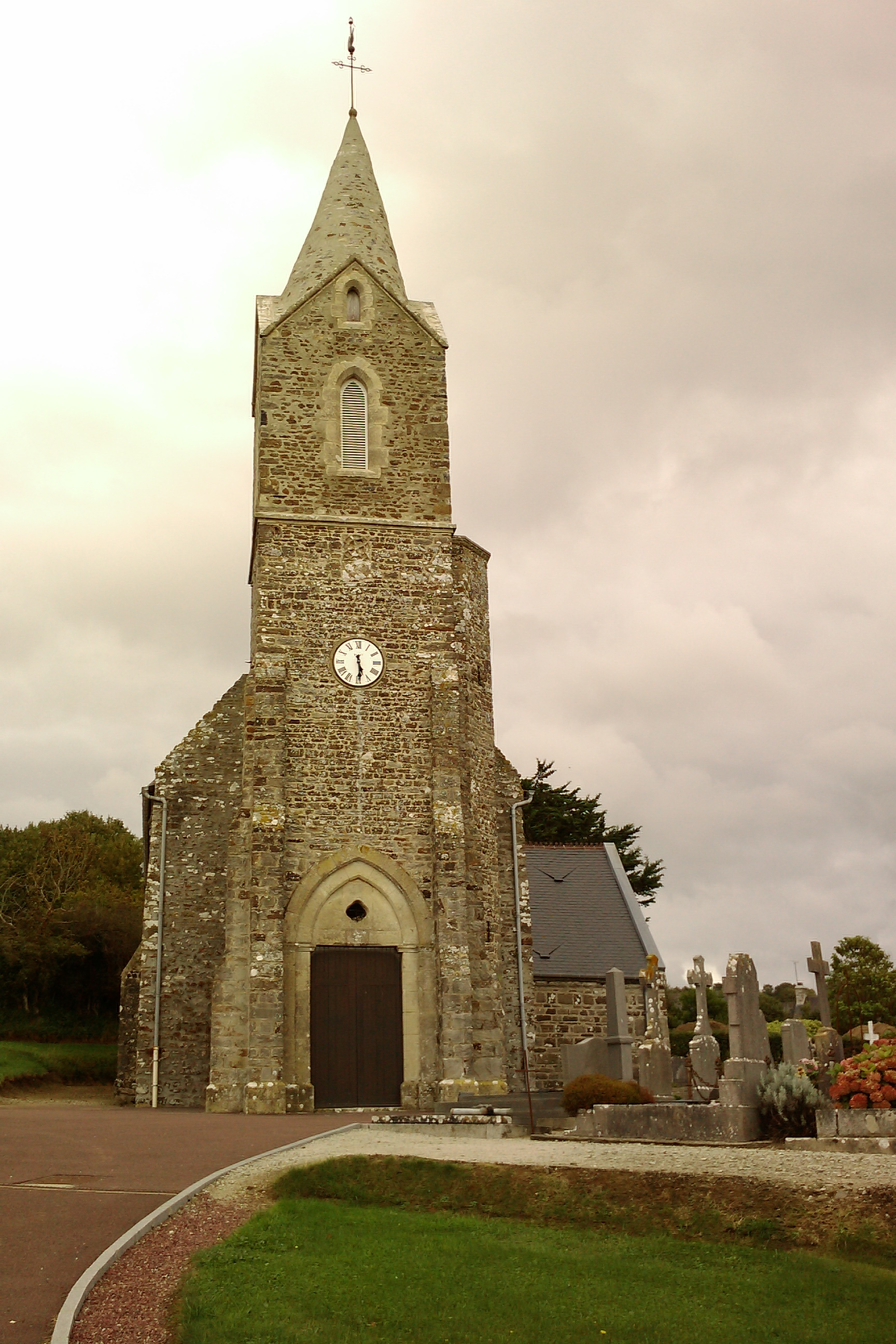 église de Saint-Jean-de-la-Rivière